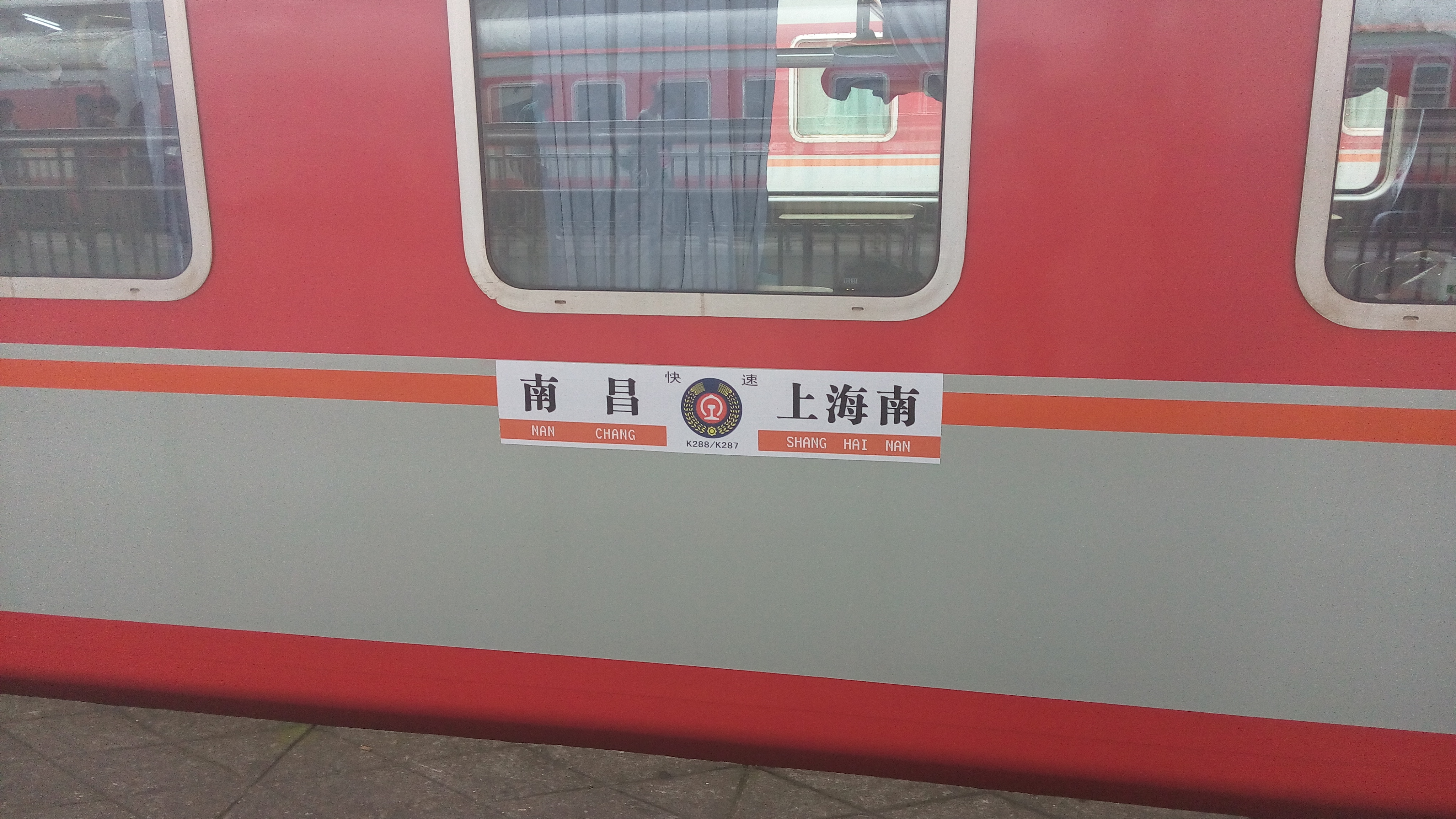 停靠在南昌站的K287的水牌